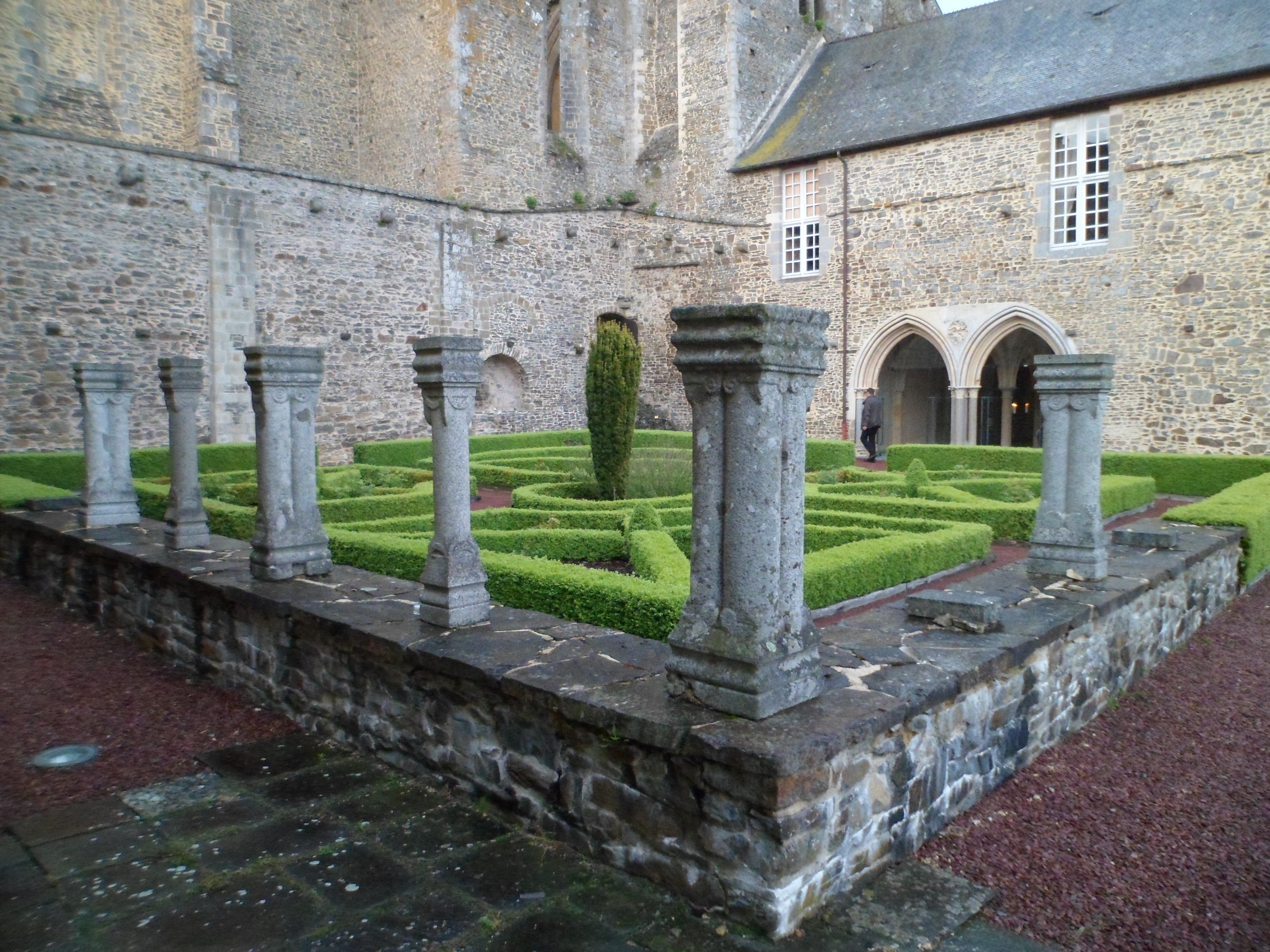 Abbaye de Hambye, ouvert dans le cadre de l'opération Pierres en lumière 2012